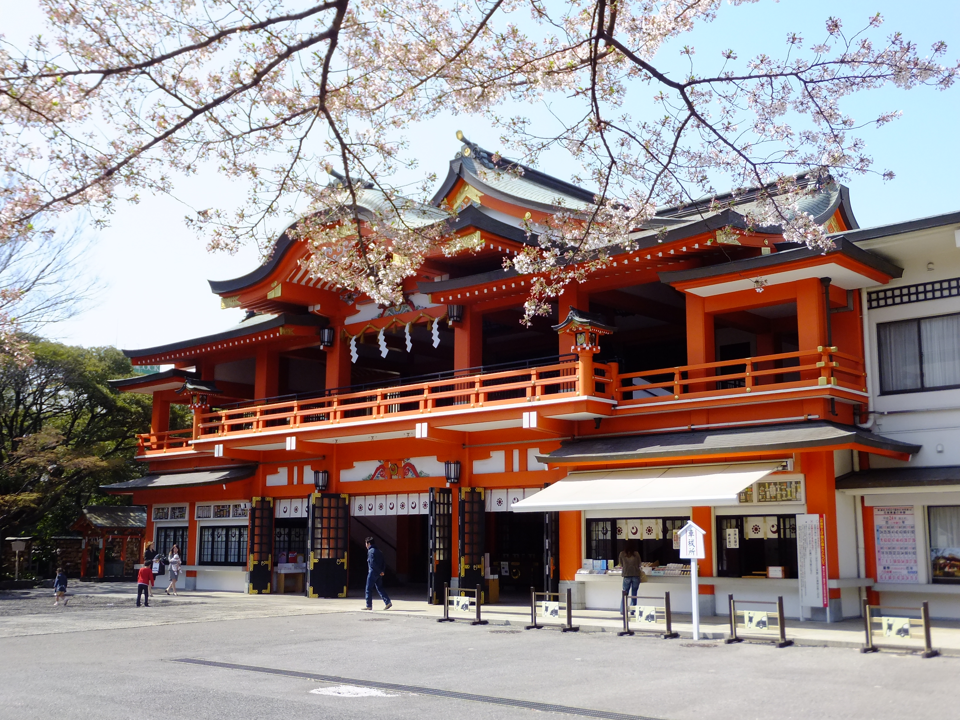 千葉神社社殿